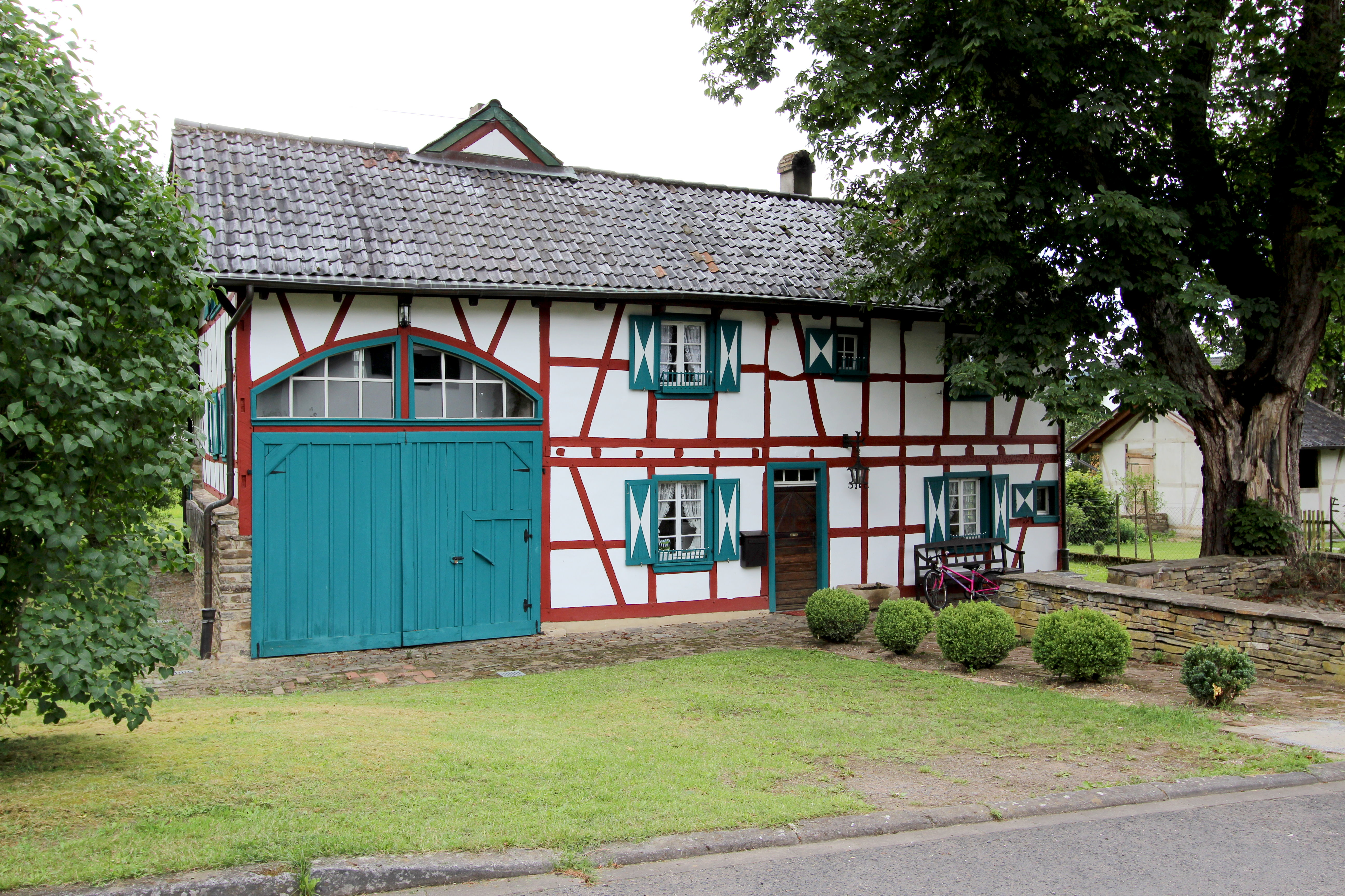 53520 Insul, Bergstraße 3. Hofanlage; Fachwerkhaus, 19. Jahrhundert. Aufnahme von 2017.